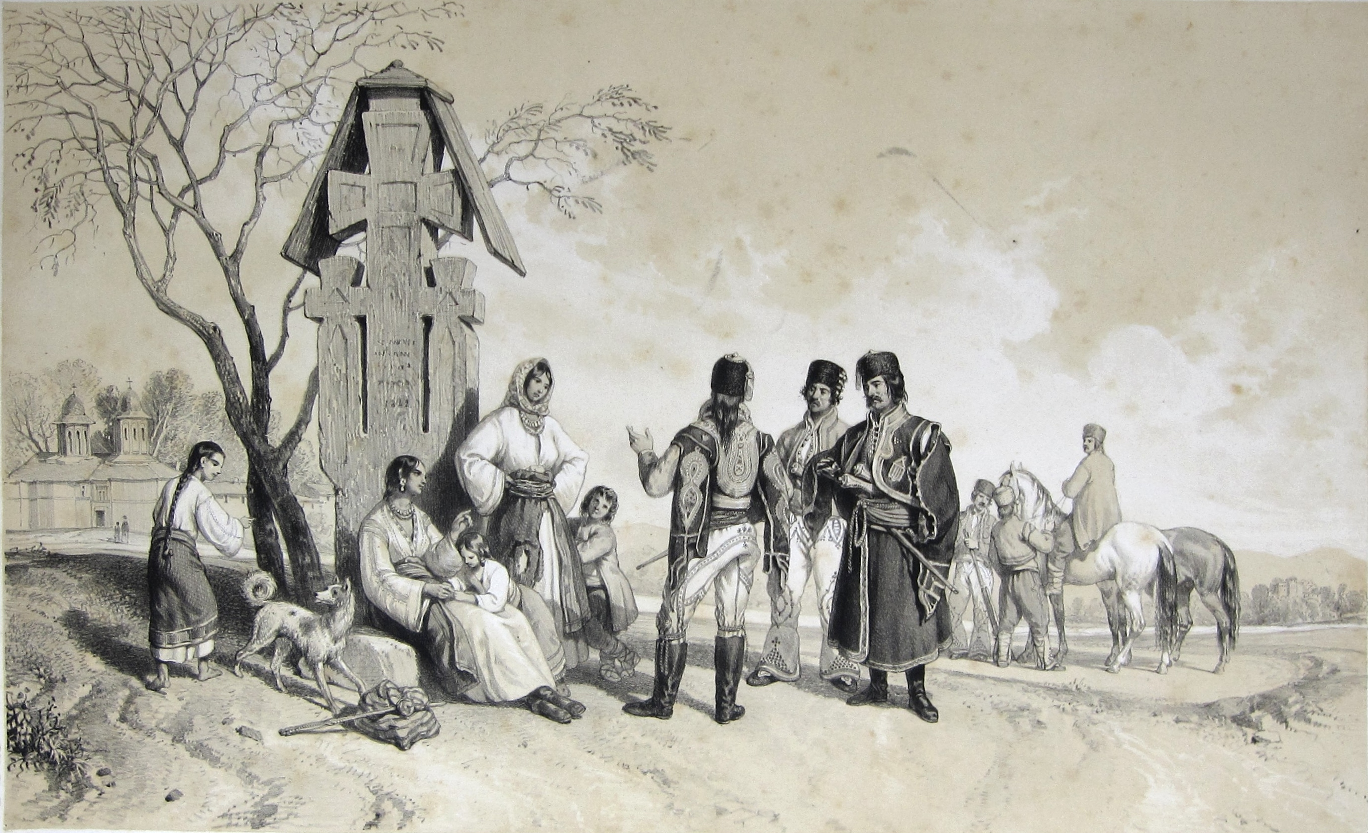 Album valaque : Vues et costumes pitoresques de la Valachie dessinés d'après nature, 1843 Drawing by Michel Bouquet; Engraving by Michel Bouquet and Eugène Cicéri Costumes de la Valachie